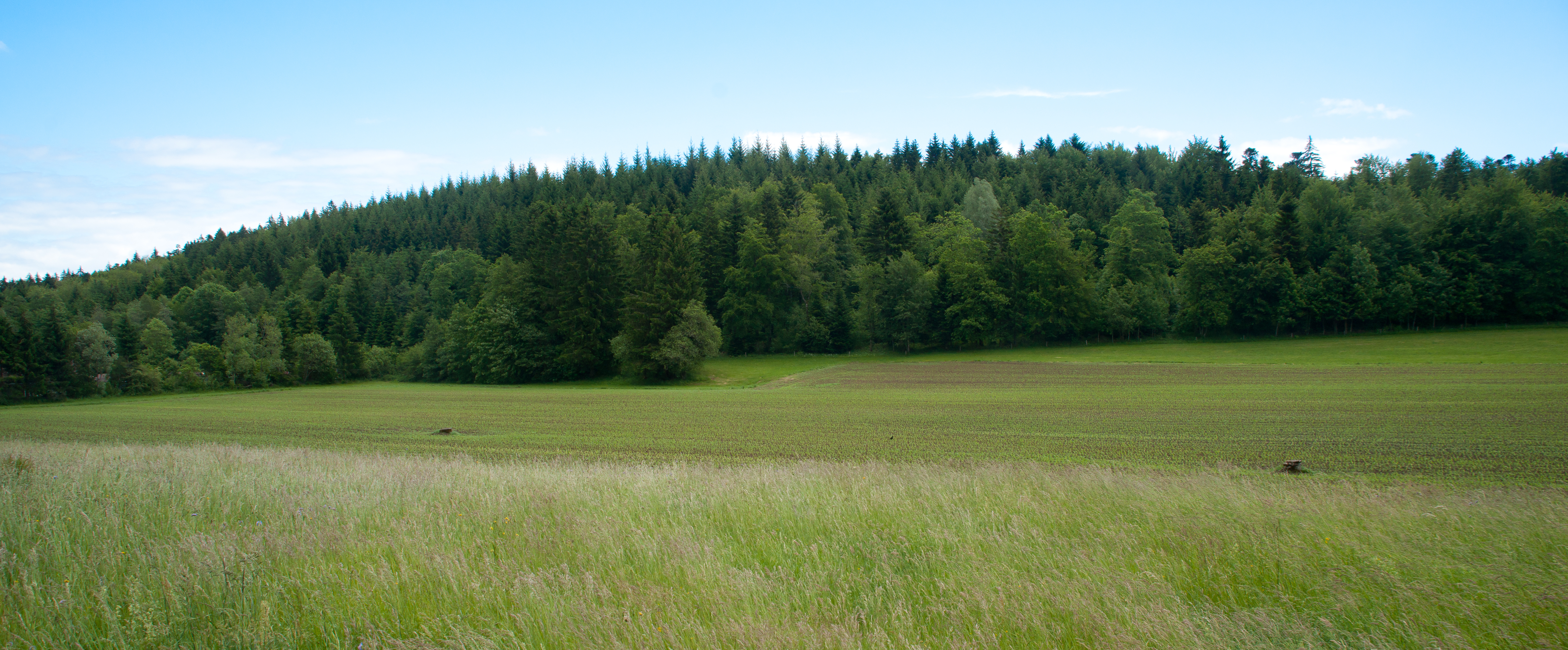 Pré de Bresonne, Jorat.